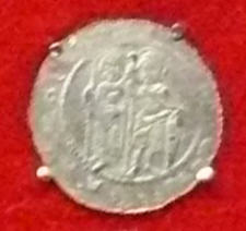 Denár Vladislava I.